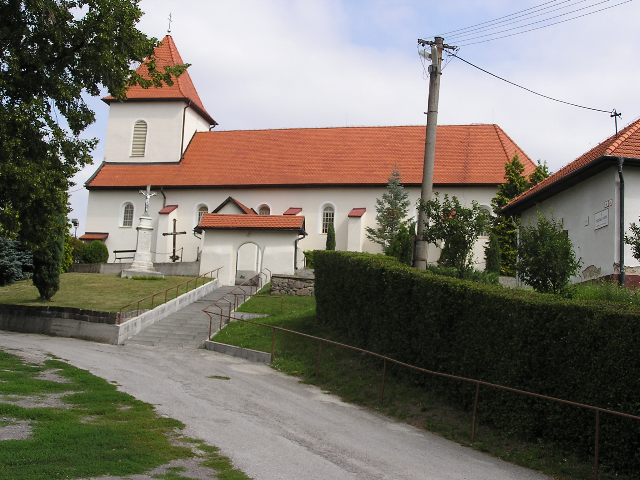 kostol